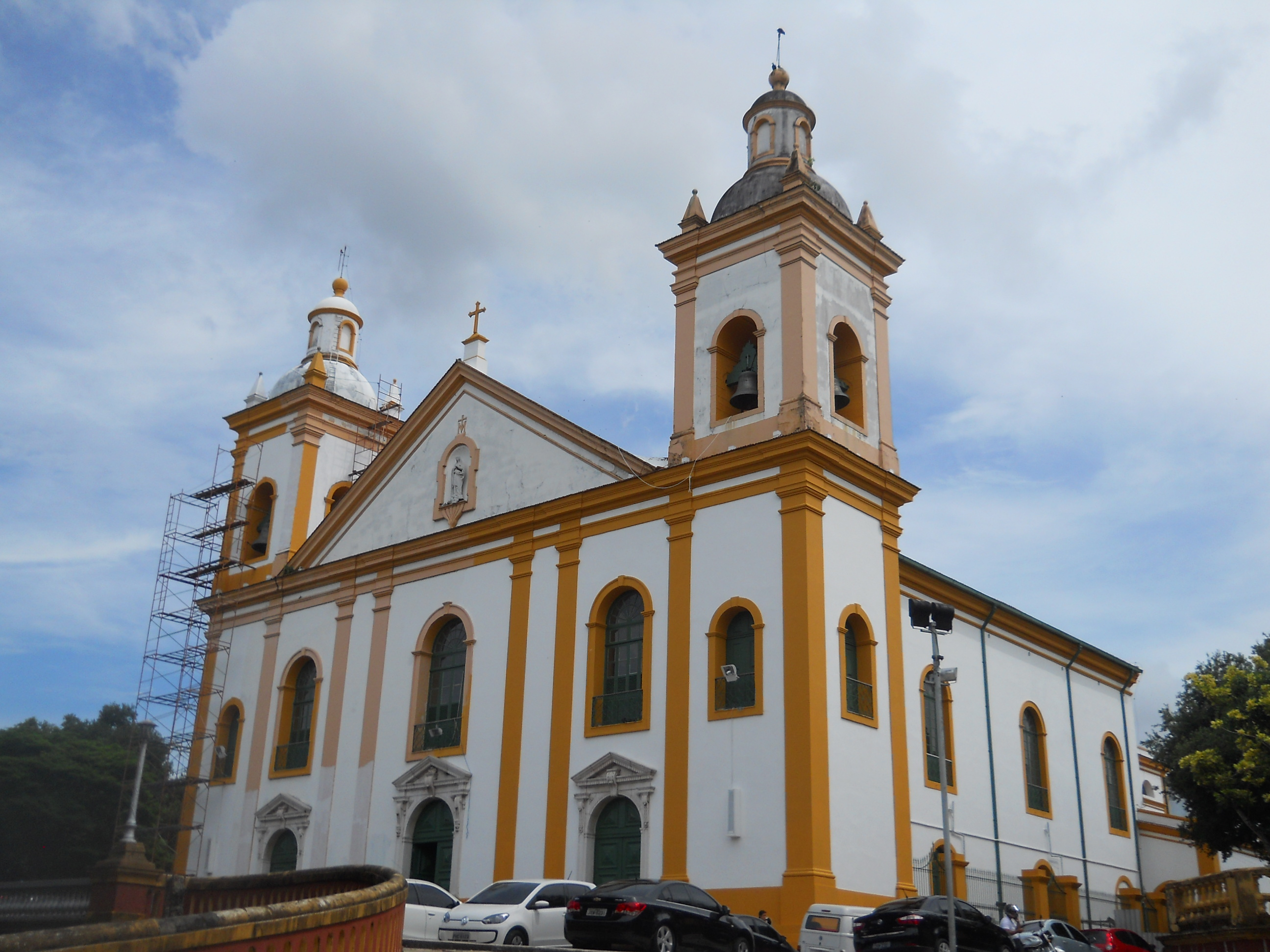 Porto de Manaus, AM: conjunto arquitetônico - Instalações portuárias situadas nas Ruas dos Barés, Marquês de Santa Cruz, Monteiro de Souza, Vivaldo Lima, Taqueirinha,Visconde Mauá, Praça Oswaldo Cruz e Ilha de São Vicente e ainda, as edificações situadas na Avenida Eduardo Ribeiro nº 02 - Alfândega e